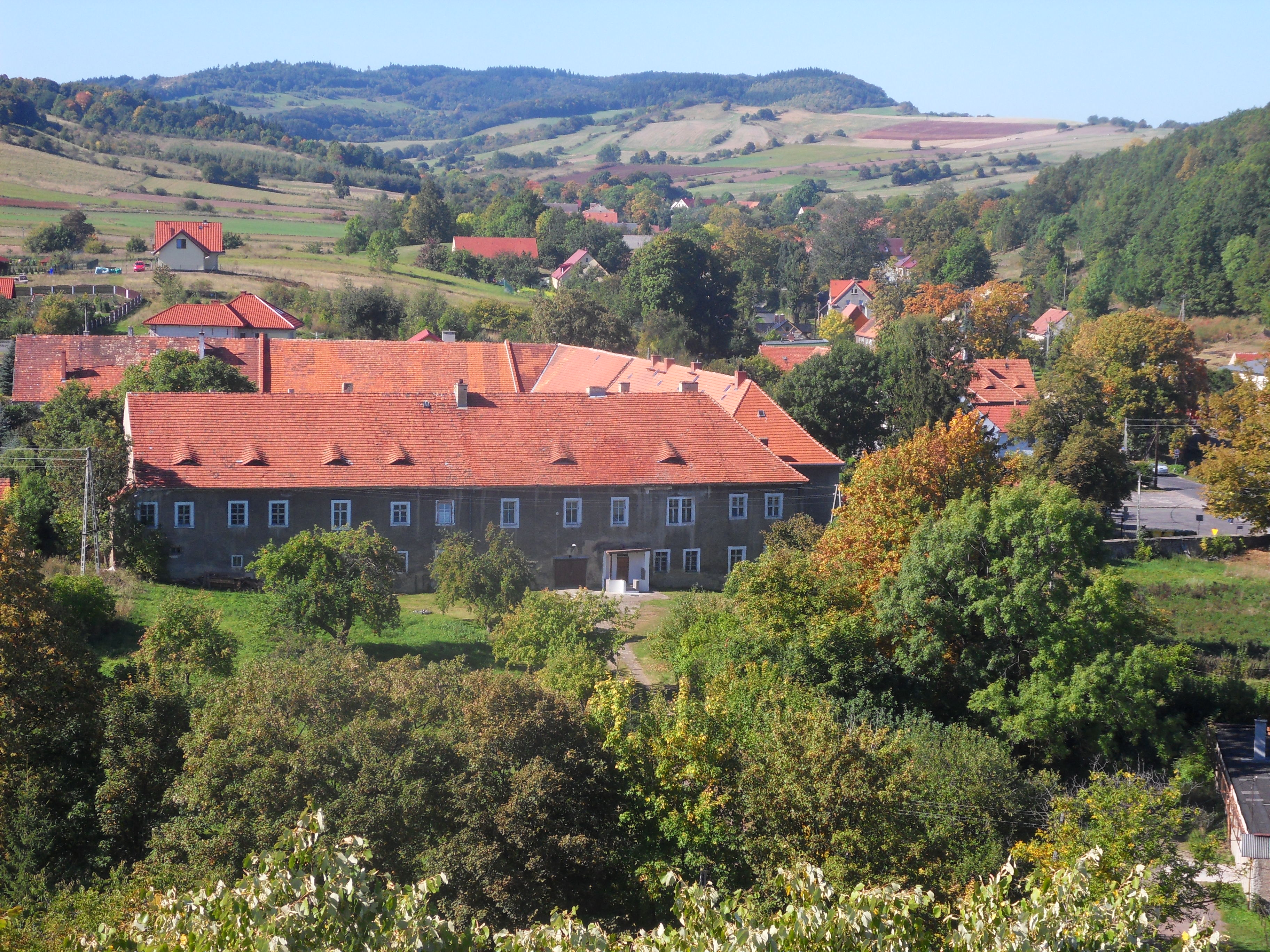 Stare Bogaczowice, klasztor cystersów, ob. urszulanek, kon. XVII, XIX/XX